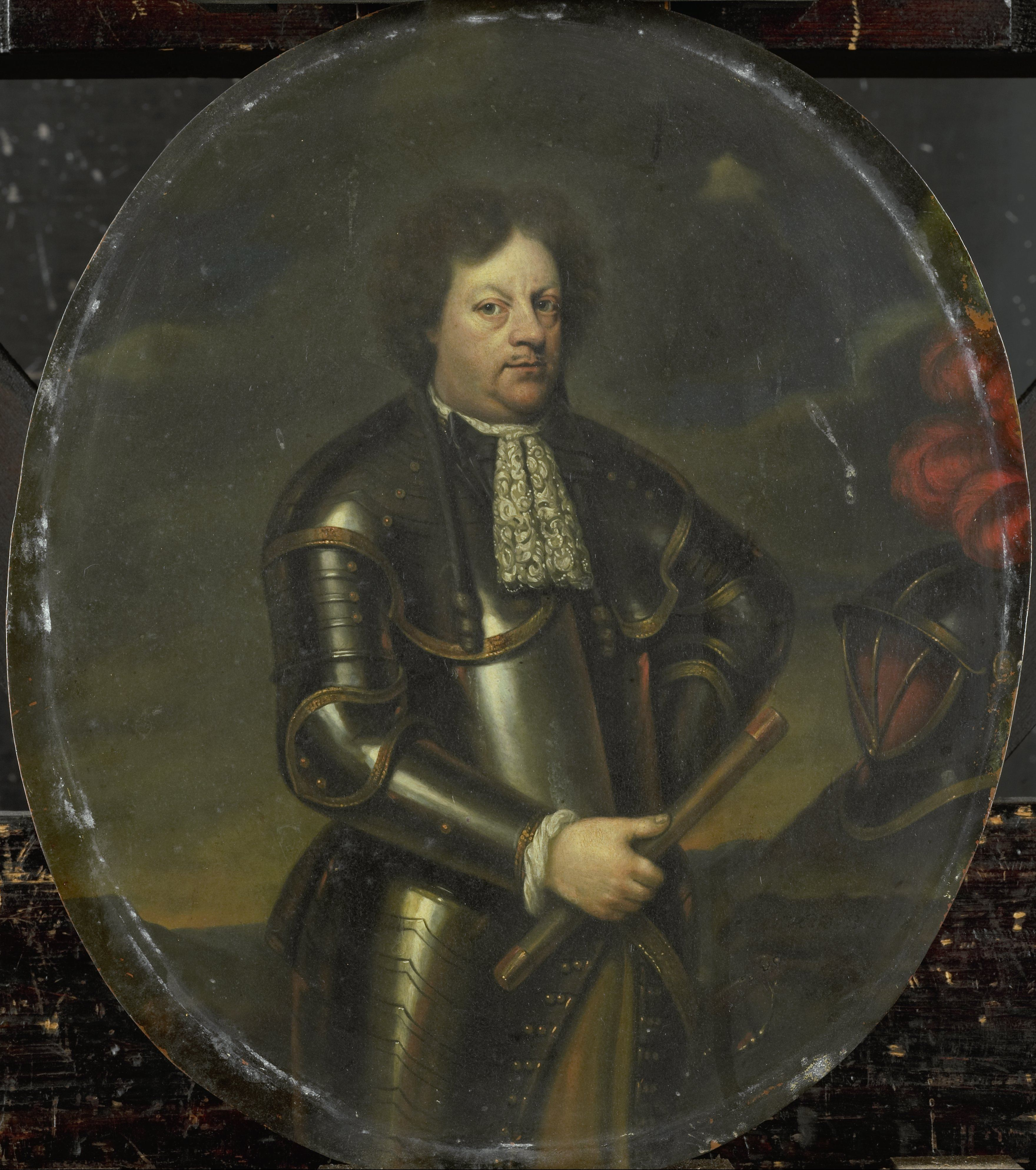 Portret van Hans Willem van Aylva (1633-1691), generaal-majoor, genoemd 'de ontzaglijke generaal'. Kniestuk, in een ovaal, staande in wapenrusting in een landschap, commadostaf in de rechterhand, de helm rechts op een rots. Pendant van SK-A-1402.